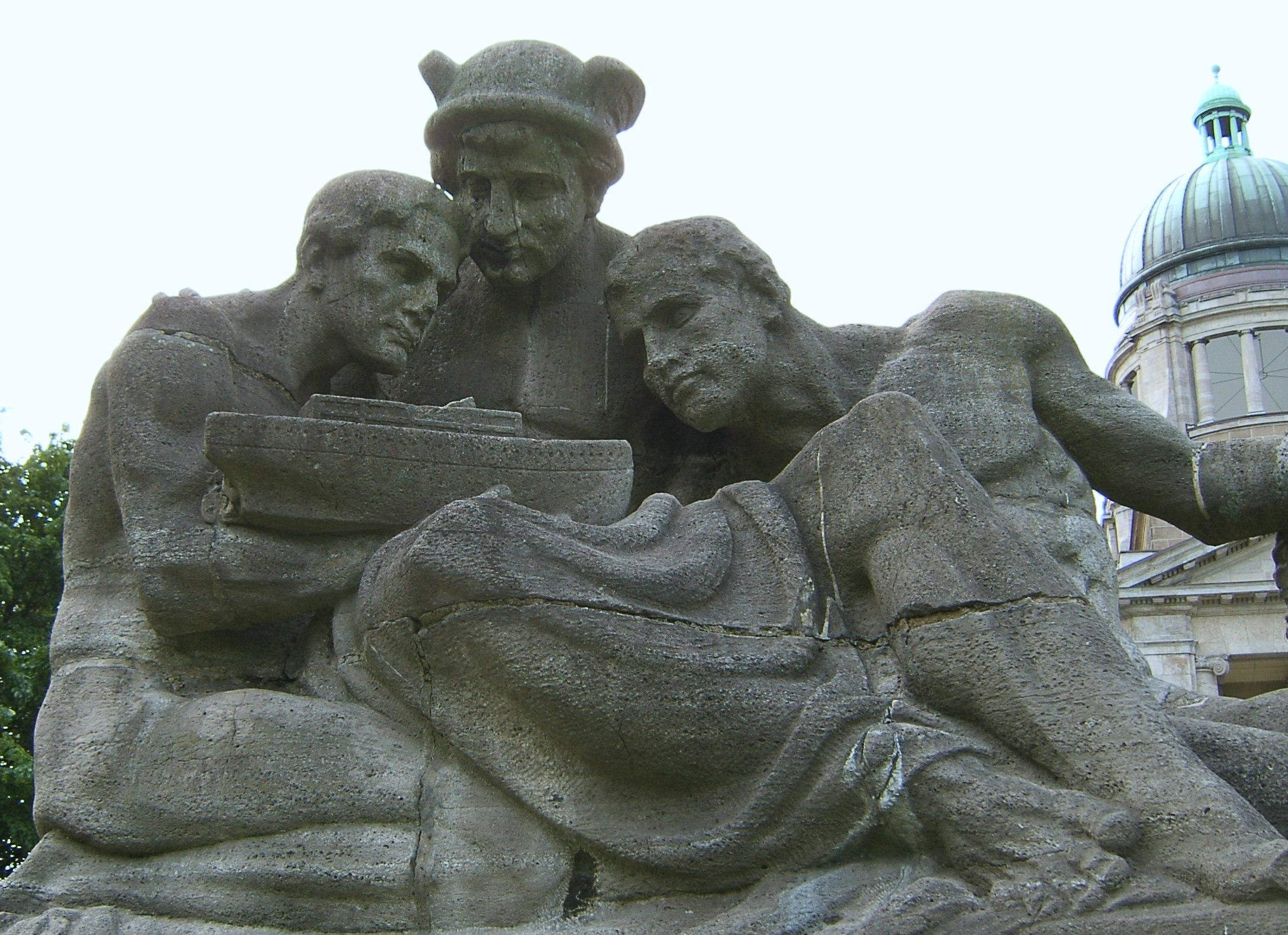 Die Figurengruppe aus Muschelkalk von Arthur Bock, 1912 errichtet, steht in der Grünanlage beim Sievekingsplatz vor dem Hanseatischen Oberlandesgericht in der Hamburger Neustadt. Sie verkörpert Technik, Handel und Industrie.